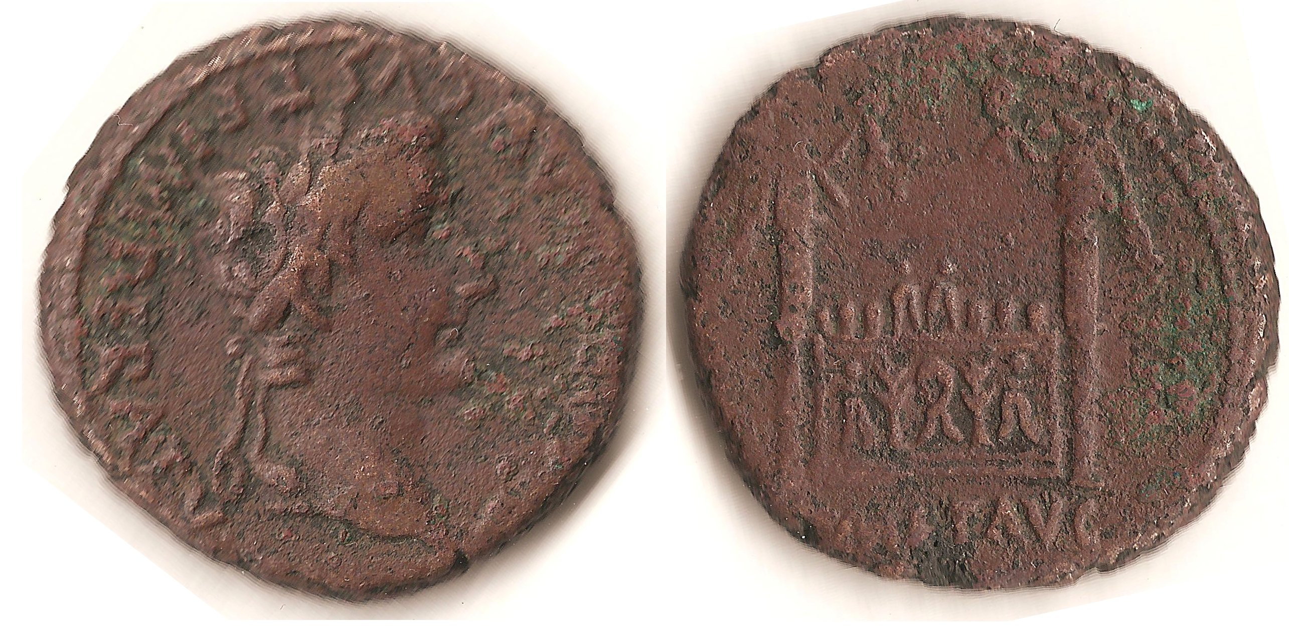 Photo avers - revers d'une monnaie romaine trouvée à SUIN (71) FRANCE probablement frappée sous Tibère en 14 ap. J.-C. avers (AVGVST F IMPERAT V) : Buste d'hommes de profil droit, entouré de grènetis (points constituant un cercle périphérique près la bordure circulaire de la pièce). revers (ROMETAVG) :Image représentant l'autel du sanctuaire fédéral de Lugdunum. Auteur : photo d'un objet appartenant au publiant (Sébastien Jaffre).